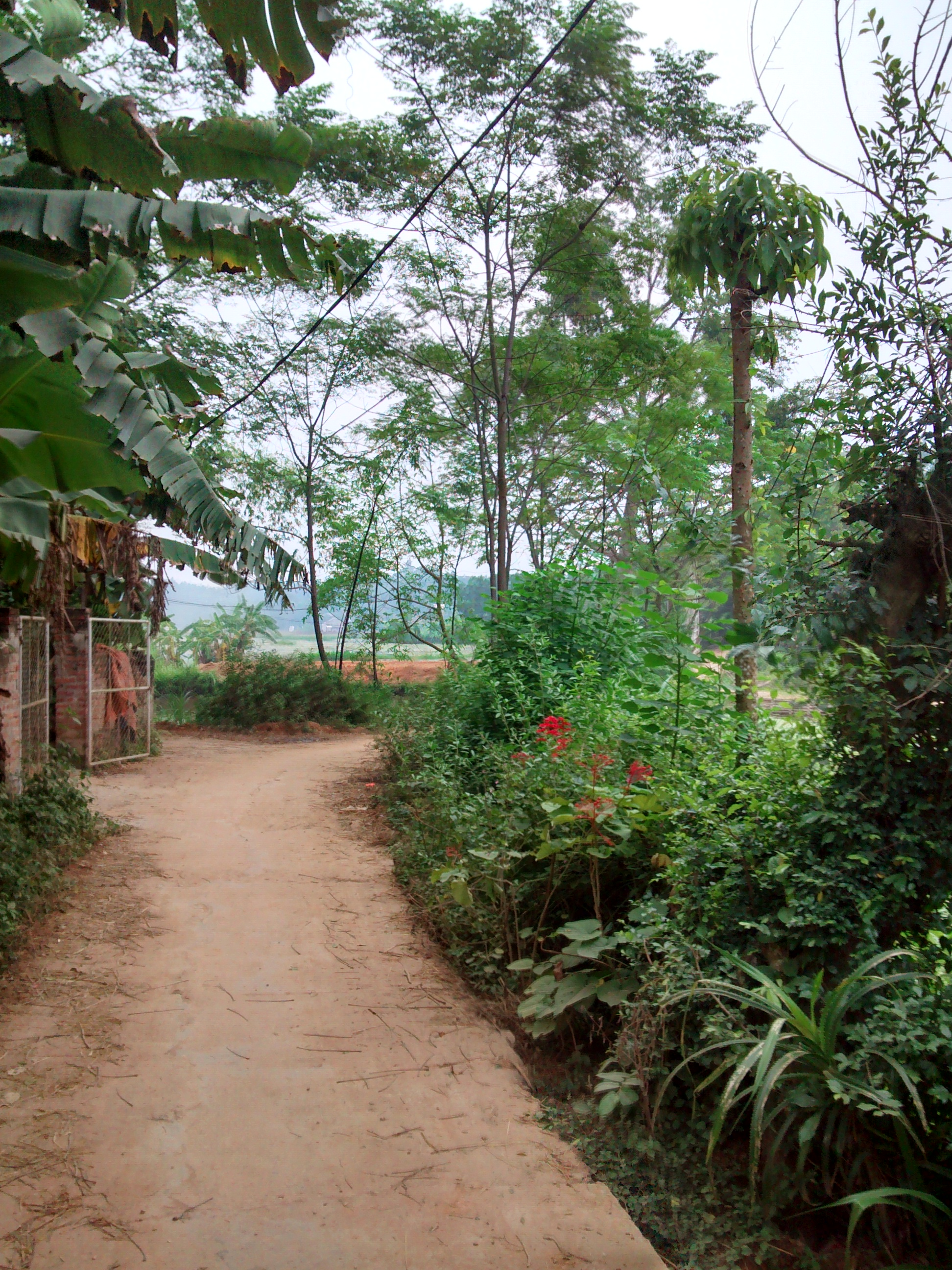 Một cảnh đường làng ở Phú Khê